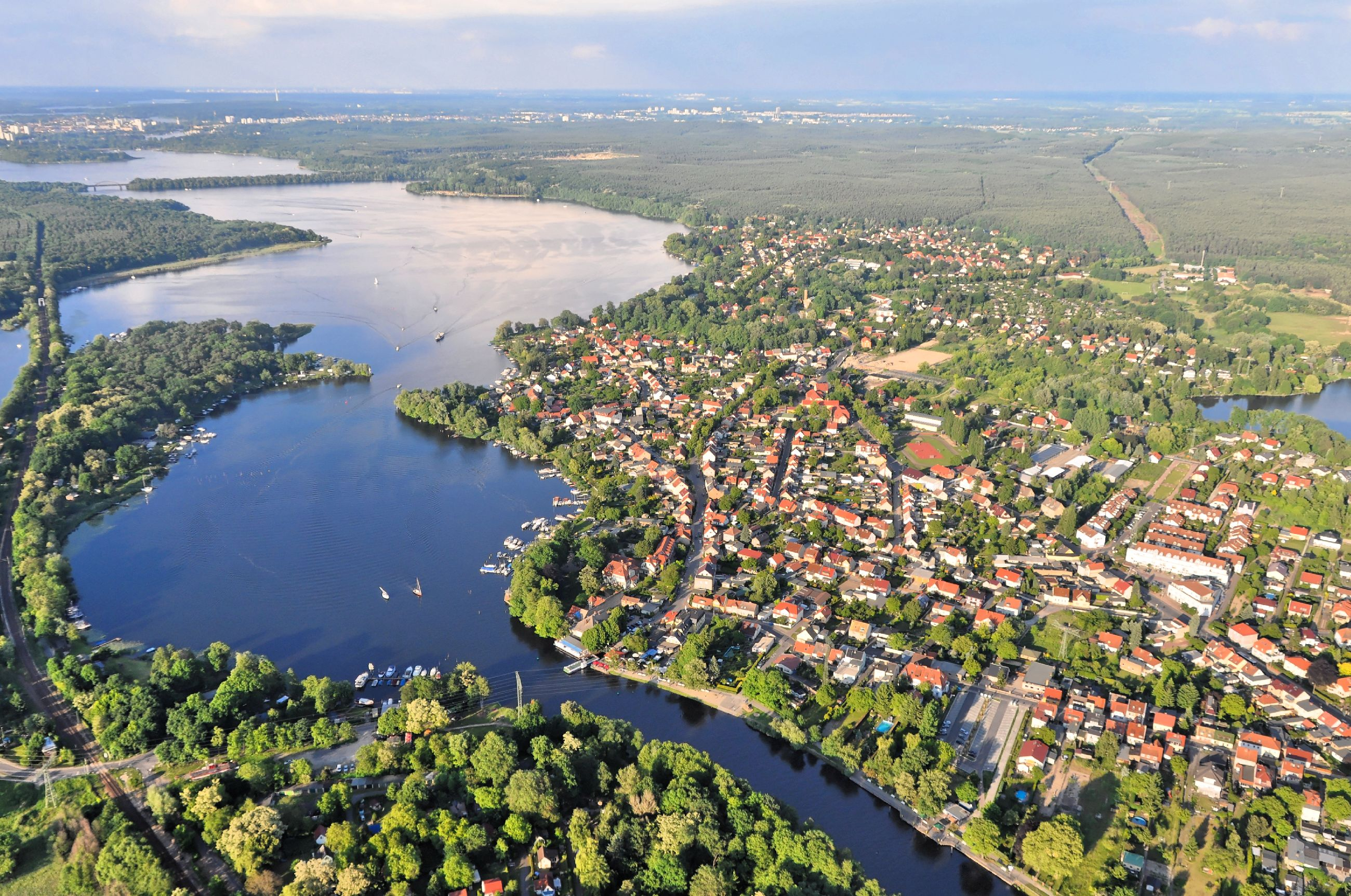 Überführungsflug vom Flugplatz Nordholz-Spieka über Lüneburg, Potsdam zum Flugplatz Schwarzheide-Schipkau. Der Templiner See. Rechts Caputh mit Caputher Gemünde (unten). Im Hintergrund Potsdam.